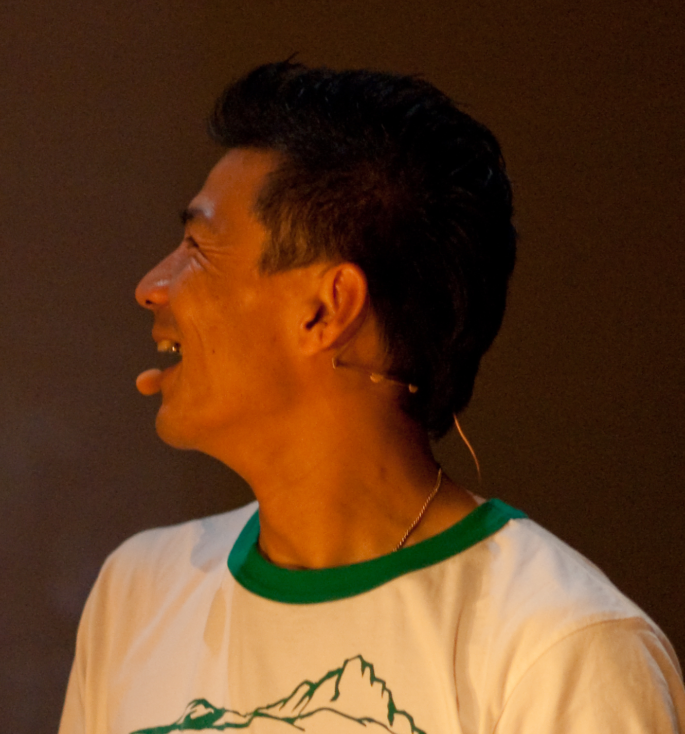 Yuji Hirayama at TEDxTokyo 2009